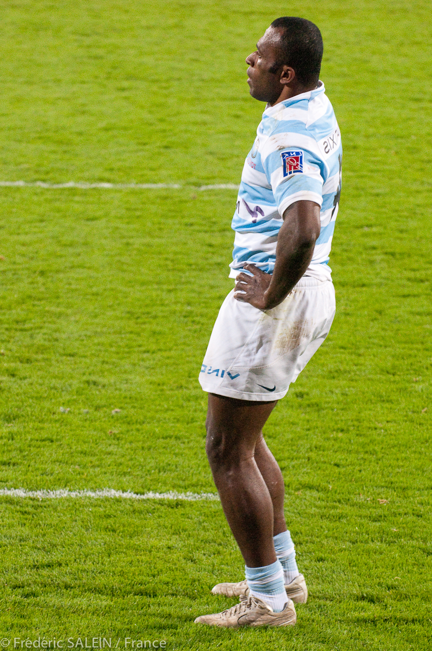 24ème match de Top 14, Le 2 avril 2010 A Toulouse (Ernest Wallon) Stade Toulousain bat Racing Métro 92 28 à 23 (mi-temps : 10-9 ) Spectateurs : 19.000 personnes environ